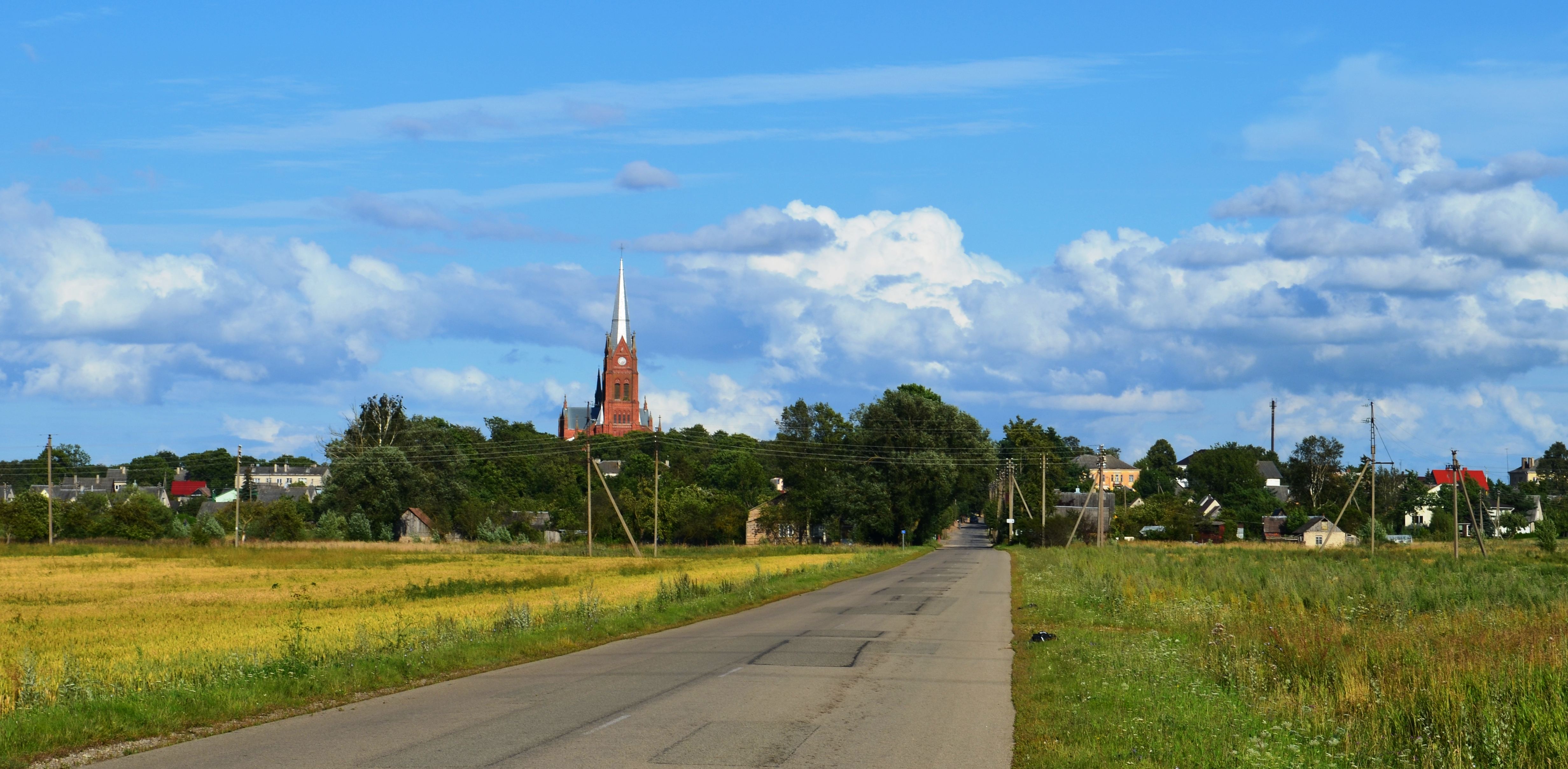 Ramygala iš rytų (nuo Krekenavos pusės), Panevėžio raj.